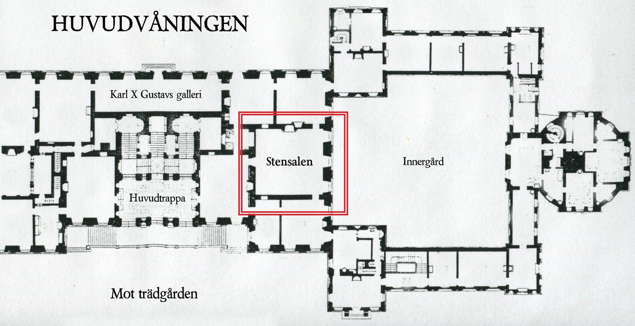 Drottningholms slott, planritning, huvudvåning, södra del, Stensalen (inom röd ram)